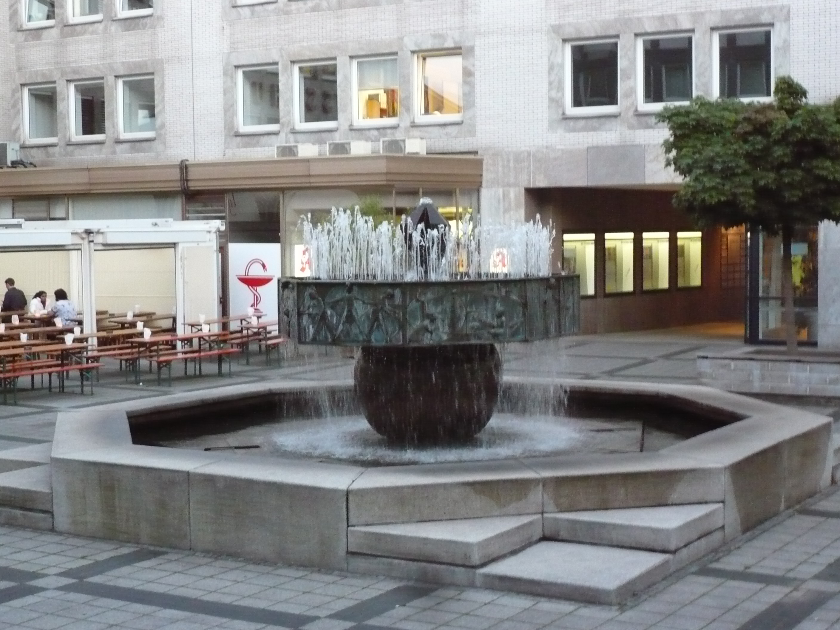 Karlshofbrunnen, geschaffen 1969 von Ottmar Hollmann